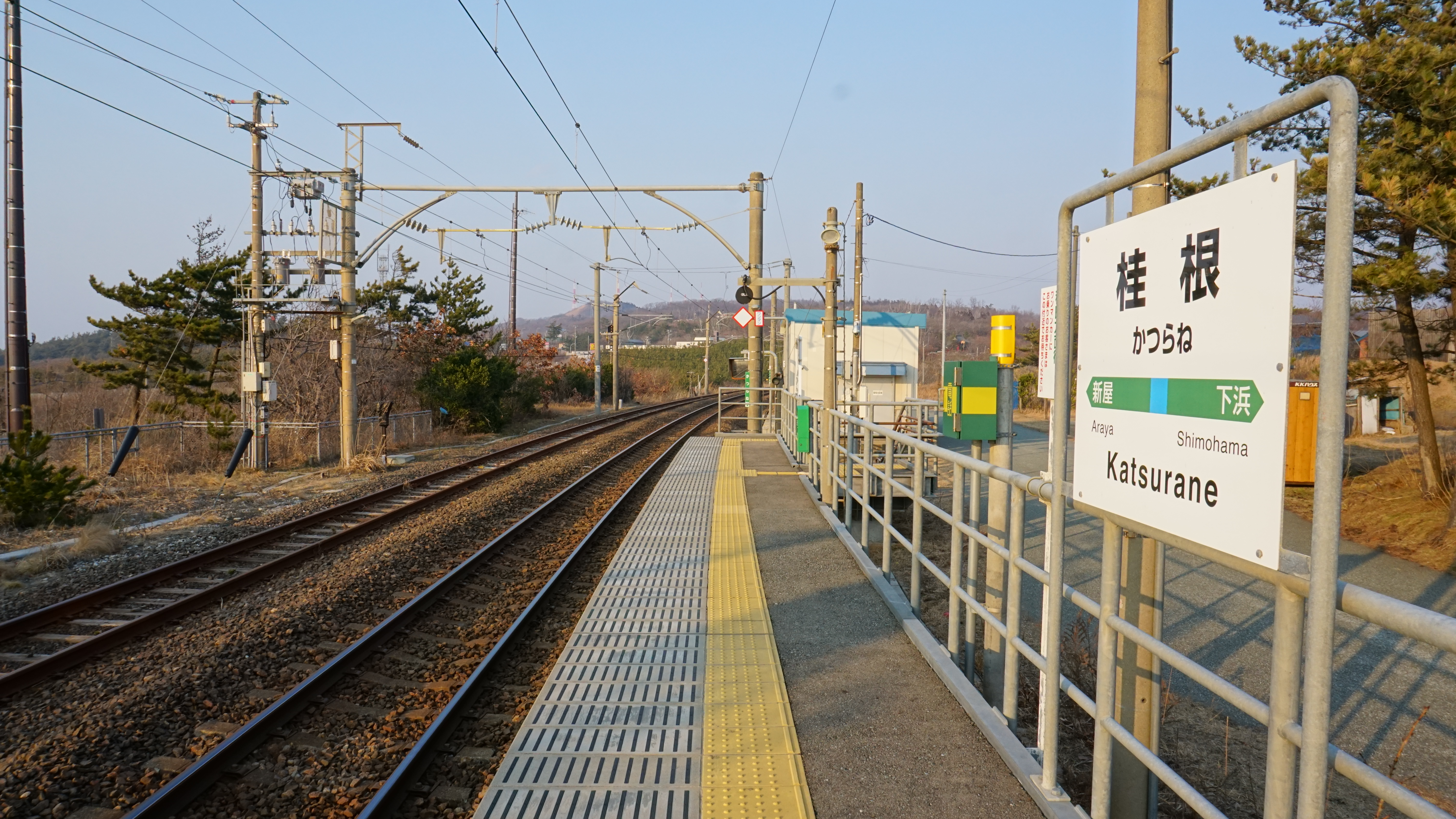 羽越本線 桂根駅（秋田県秋田市）